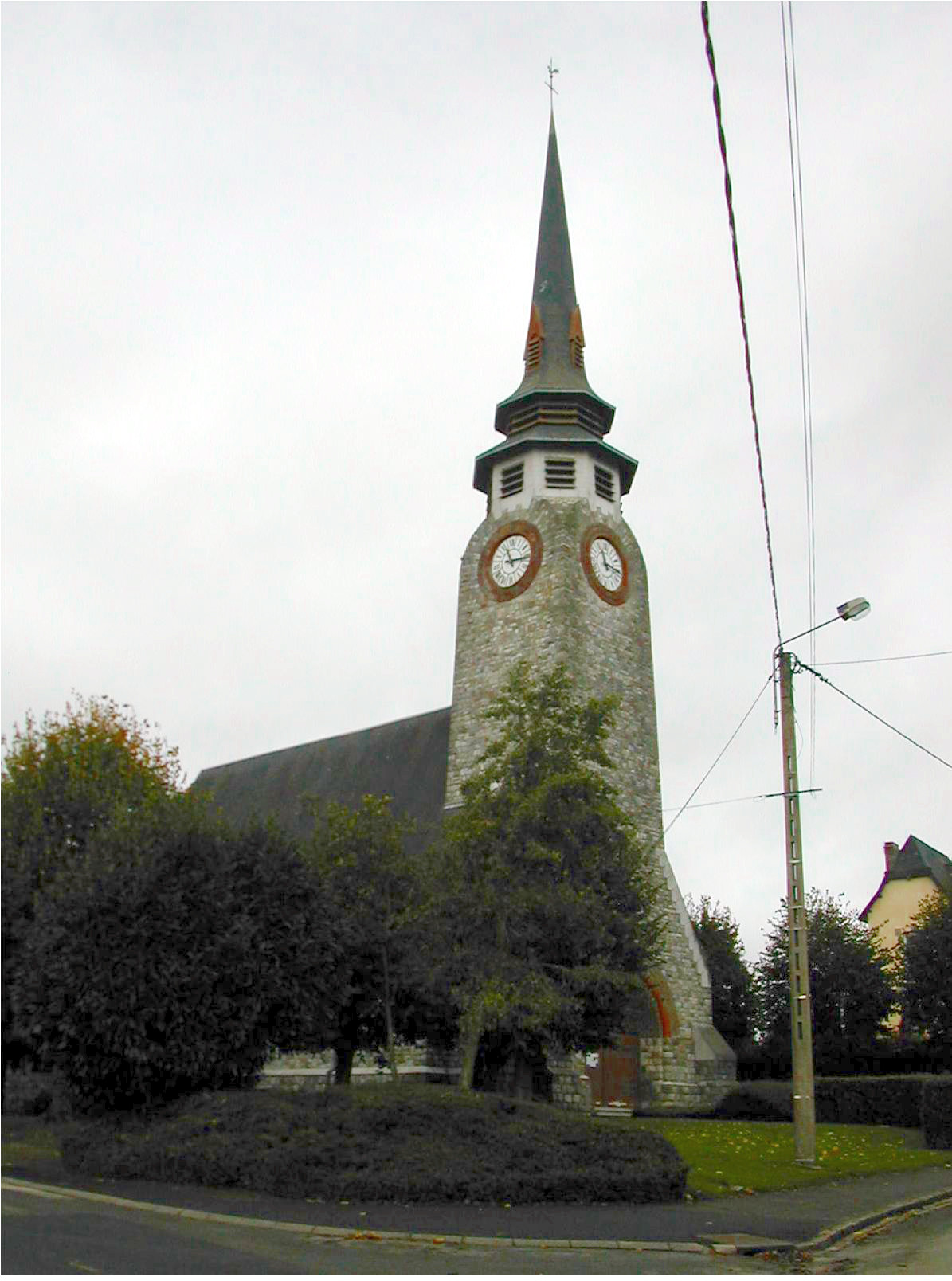 église Boiry-Sainte-Rictrude